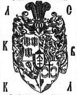 Родавыя гербы XVI i XVII стст. Віленская школа.